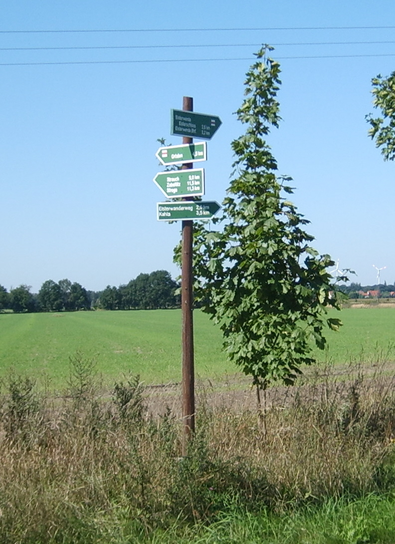 Wegweiser am Reissdamm.